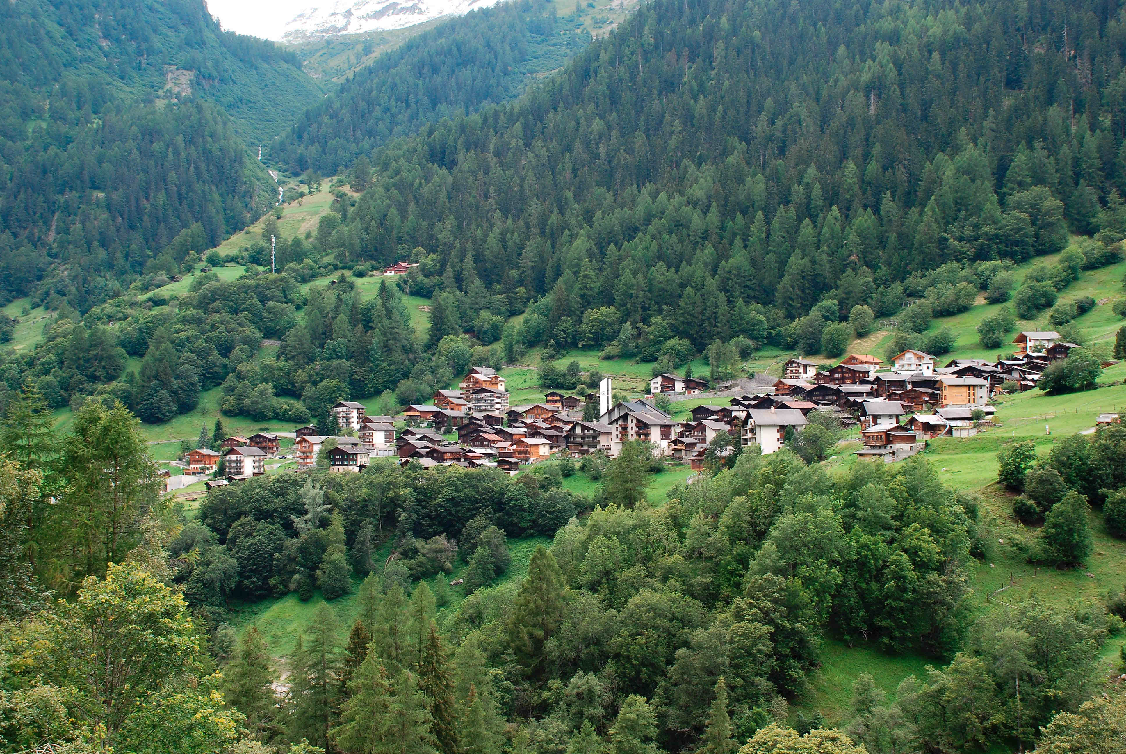 en.: Ferden at Lötschental, Switzerland; dt.: Ferden im Lötschental, Schweiz